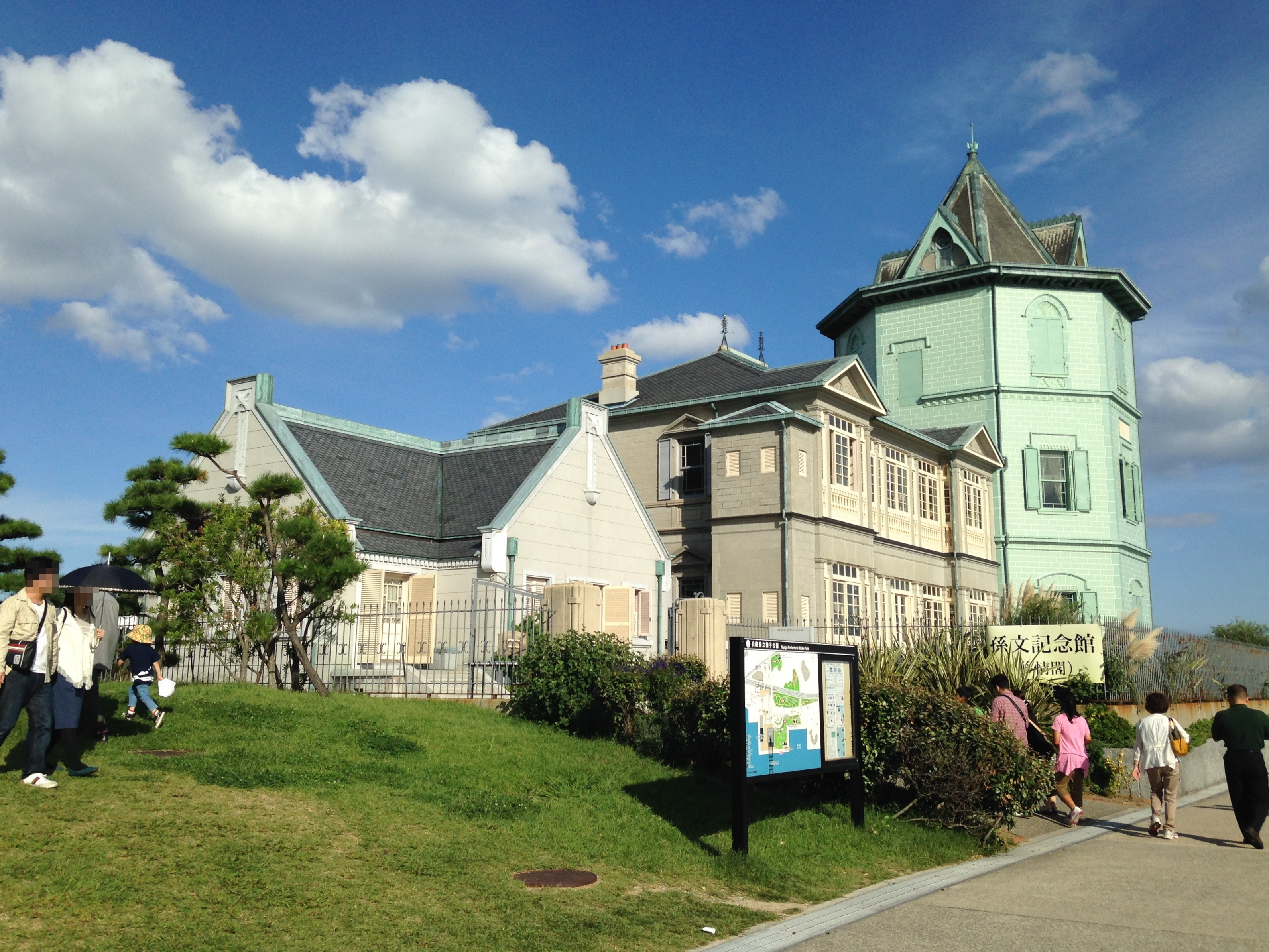 孫文記念館